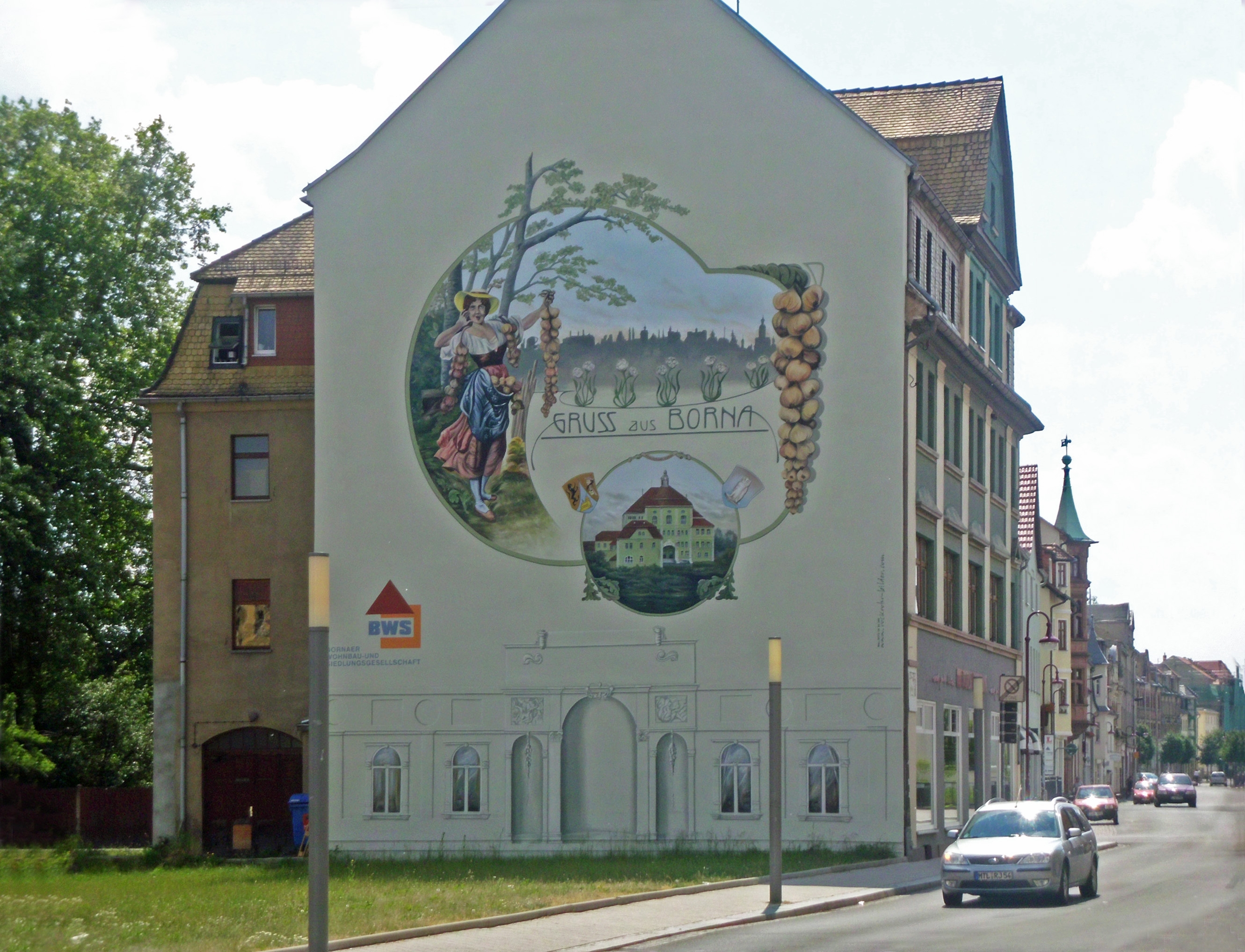 Altes Ansichtskartenmotiv an Haus in Bahnhofstraße